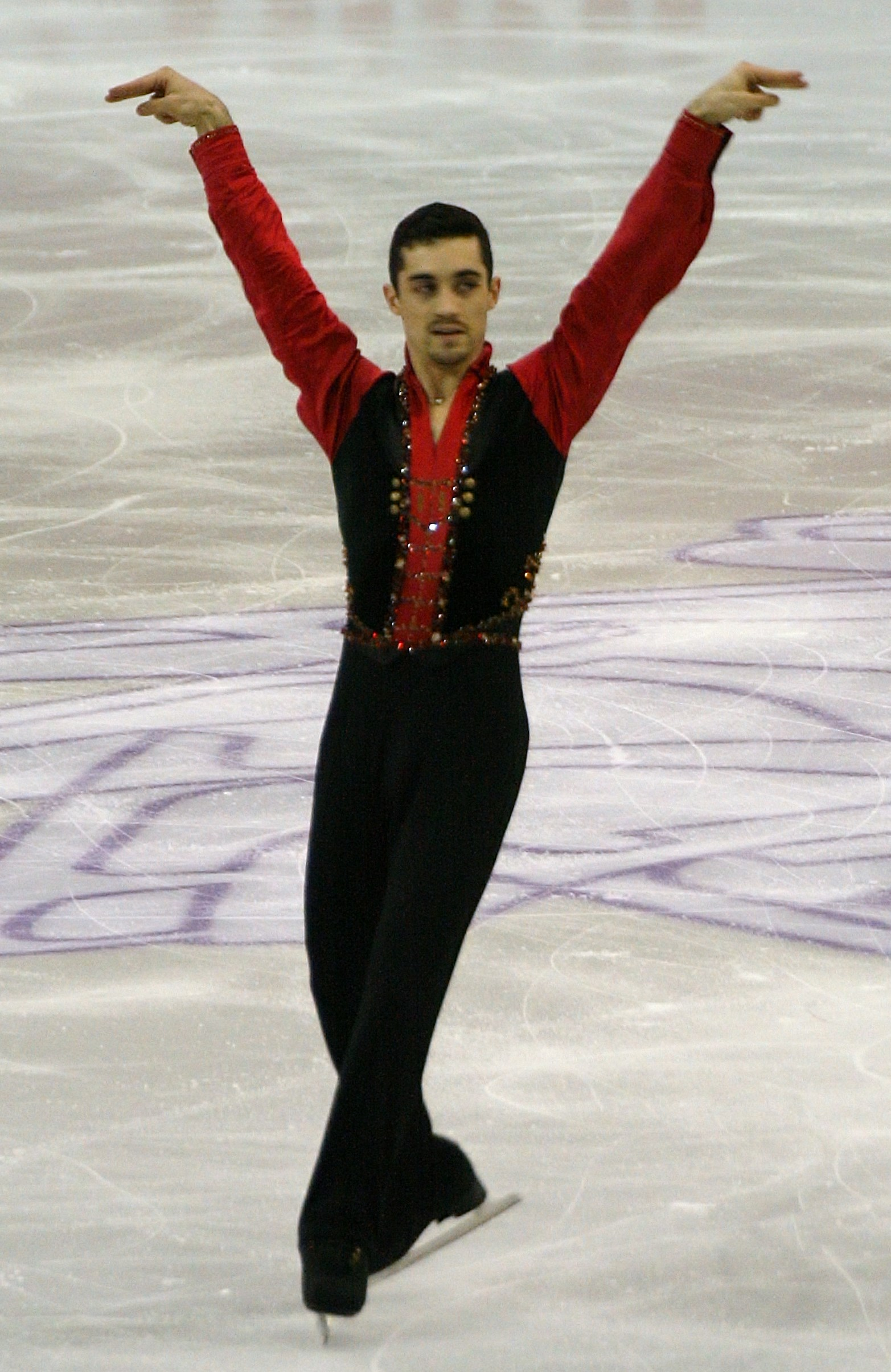 Хавьер Фернандес (Испания) на финале Гран-при по фигурному катанию 2015-2016.